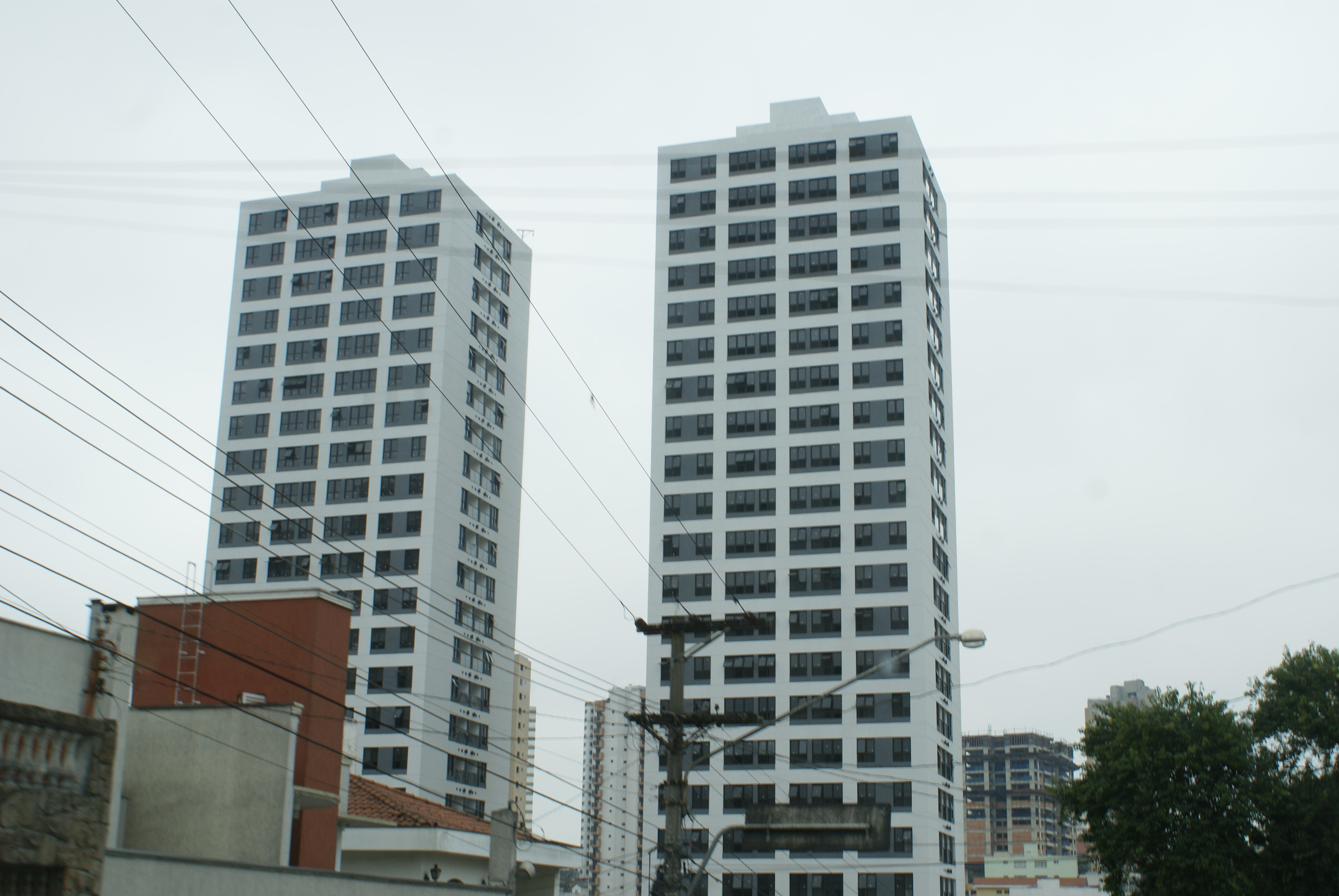 New buildings in Água Rasa district, East Zone of São Paulo City, Brazil. - Novos edifícios (Max Haus Anália Franco) no distrito da Água Rasa, Zona Leste da cidade de São Paulo, Brasil.